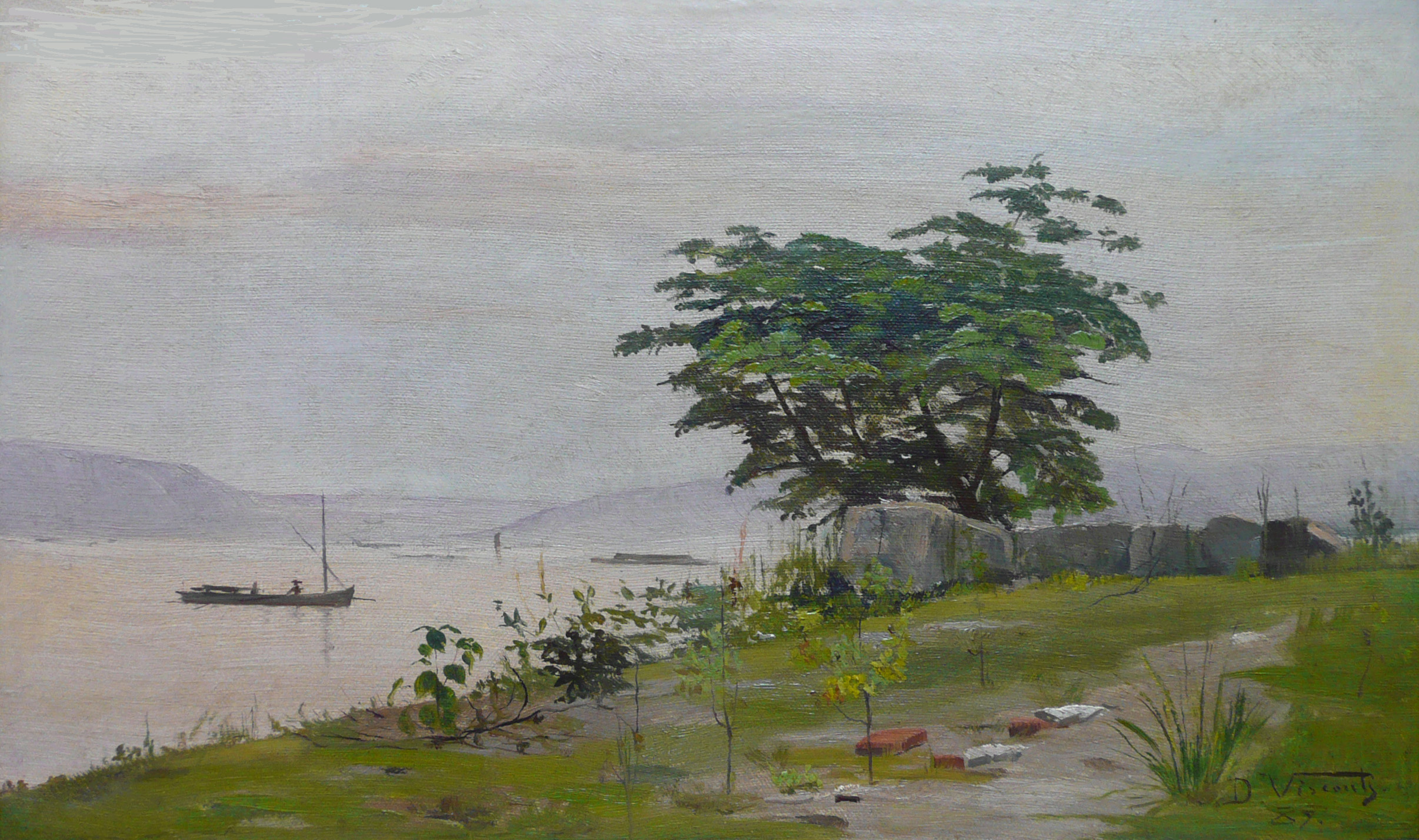 Obra do Projeto Eliseu Visconti